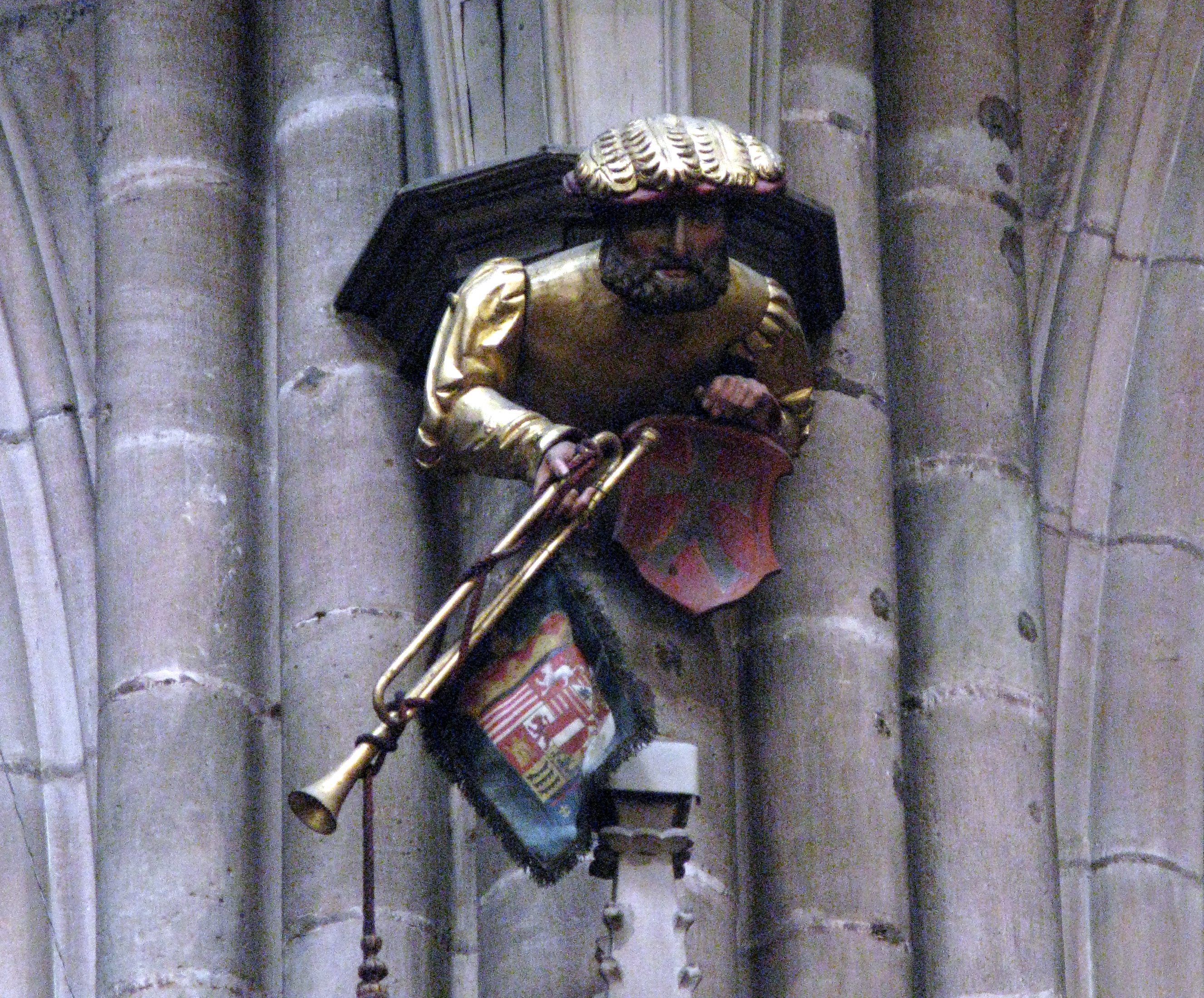 bewegliche Halbfigur (sog. "Roraffe" von Hans Sixt von Staufen) unter der Schwalbennestorgel des Freiburger Münsters, die, wenn der Organist zu Beginn eines Konzerts den Roraffenzug betätigt, die Trompete zum Mund hebt.